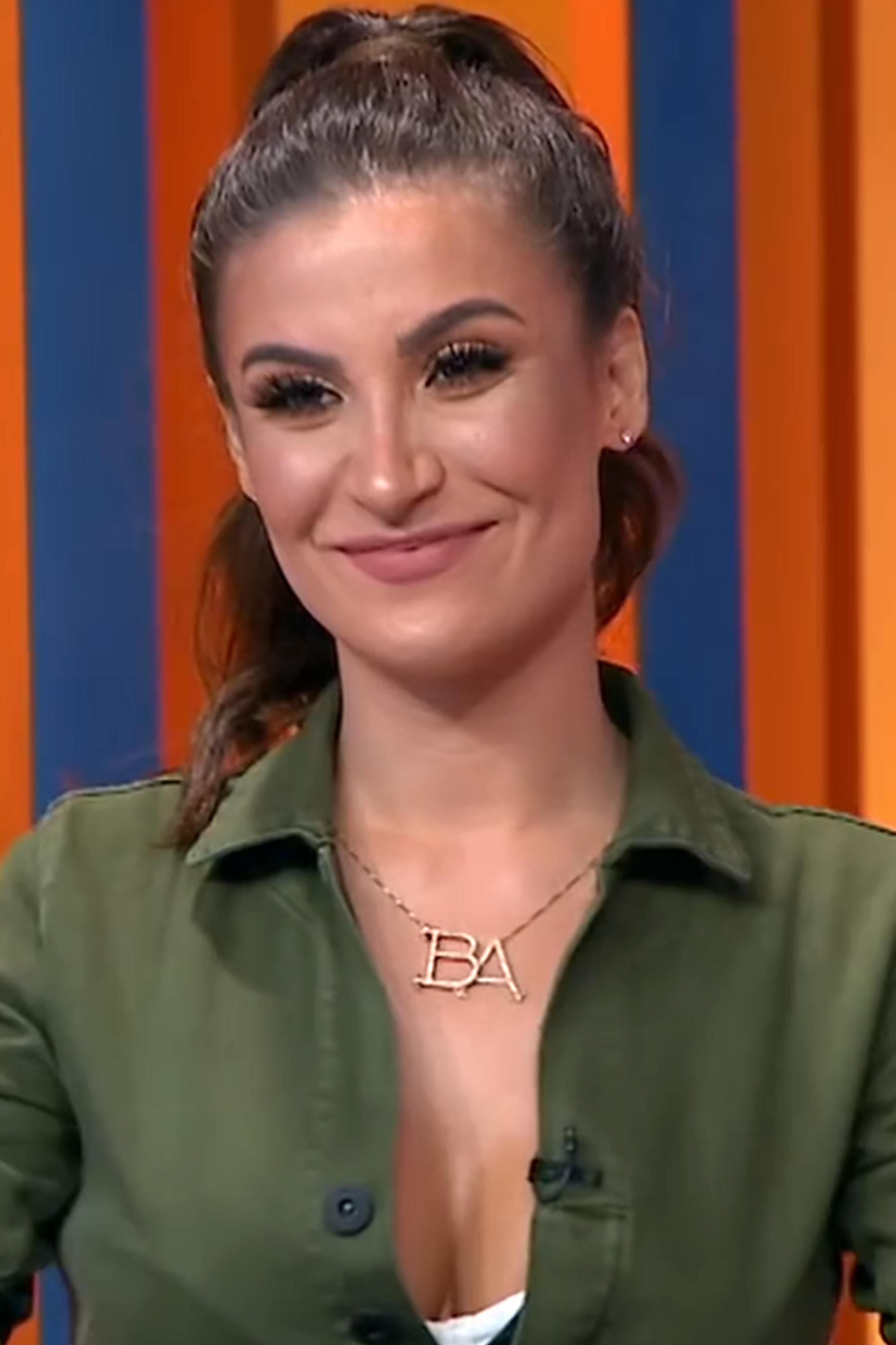 Bianca Andrade durante a sua participação no programa A Eliminação, exibido no canal no YouTube do Multishow em 27 de fevereiro de 2020.